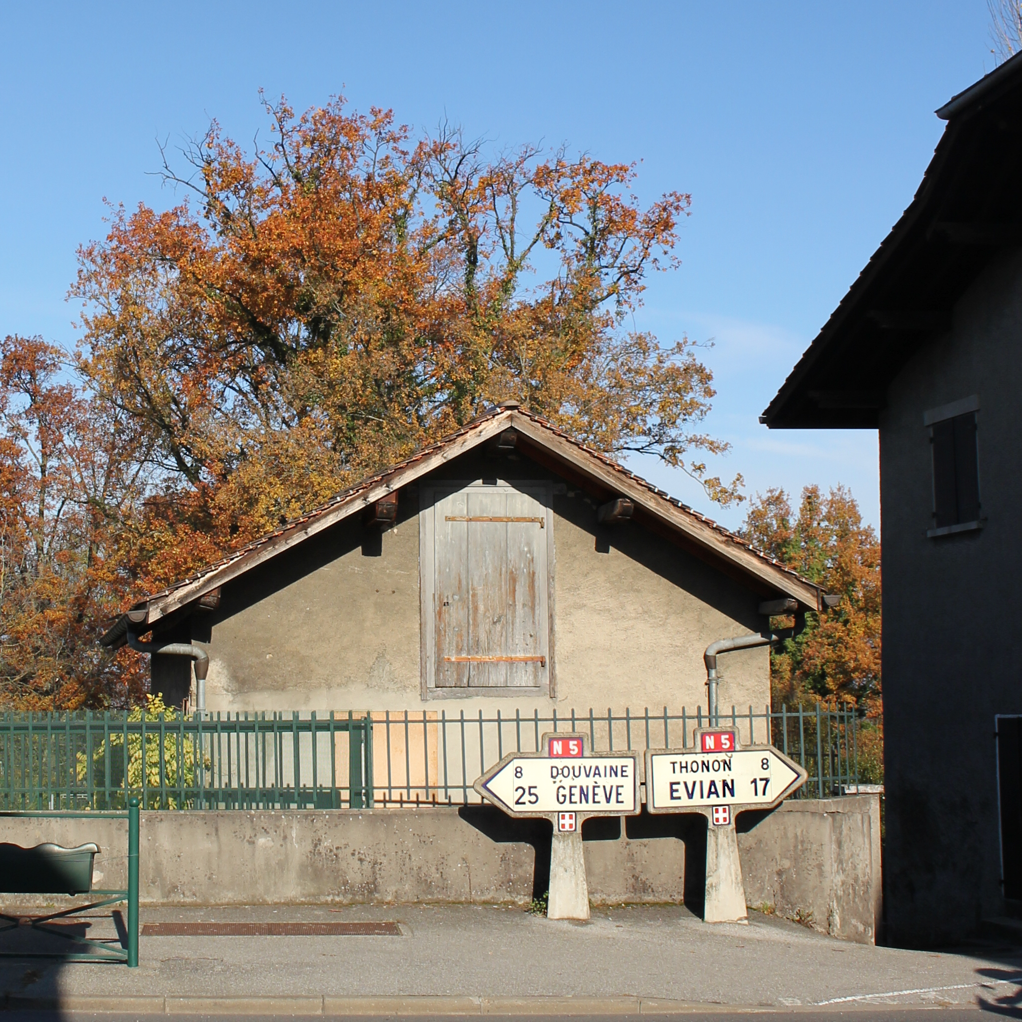 Signalétique MIchelin à Bonnatrait, Sciez-sur-Léman: Genève, Douvaine, Evian, Thonon. Avec la croix de Savoie.